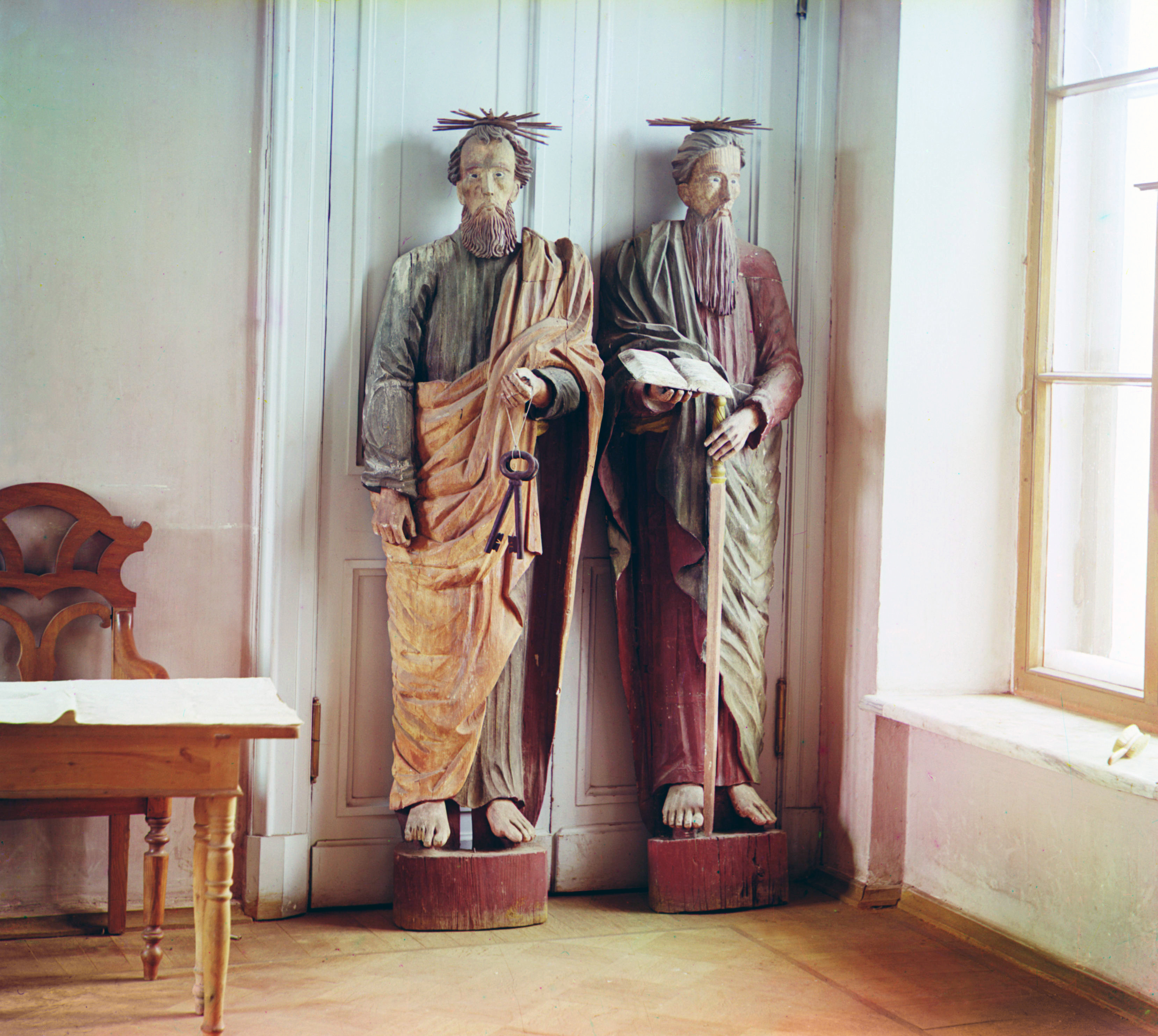 Деревянные скульптуры апостолов Петра и Павла. Тверской музей.